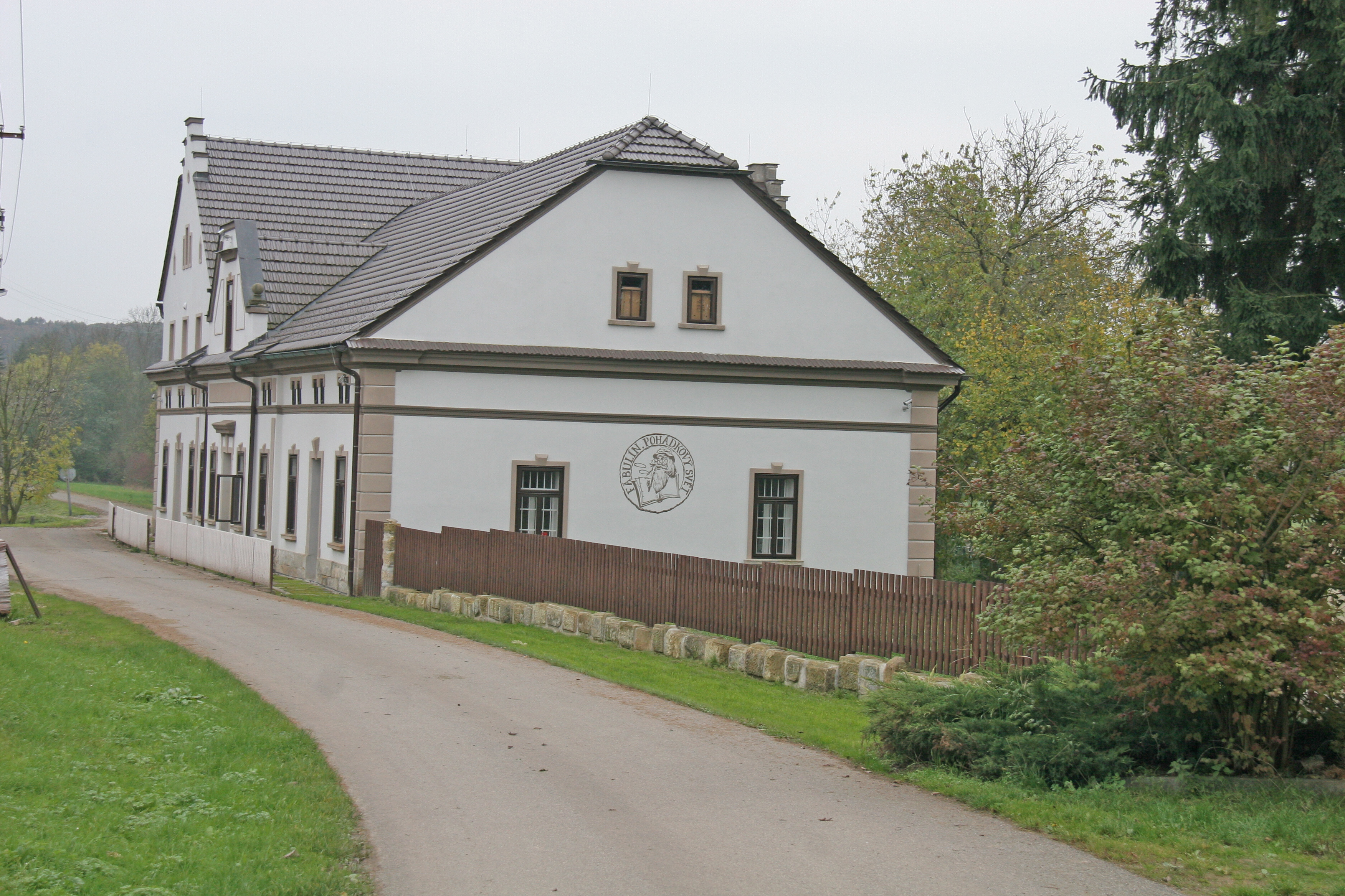 Bartoušov čp.1